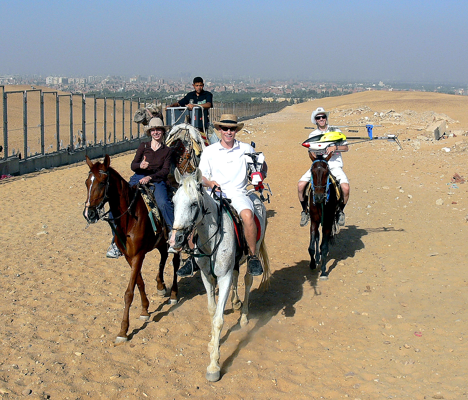 World Scenic Flights in Egypt- World Scenic Flights Film- und Stuntteam